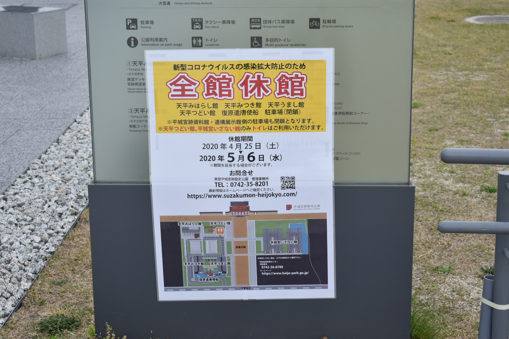 休館中の平城宮跡資料館